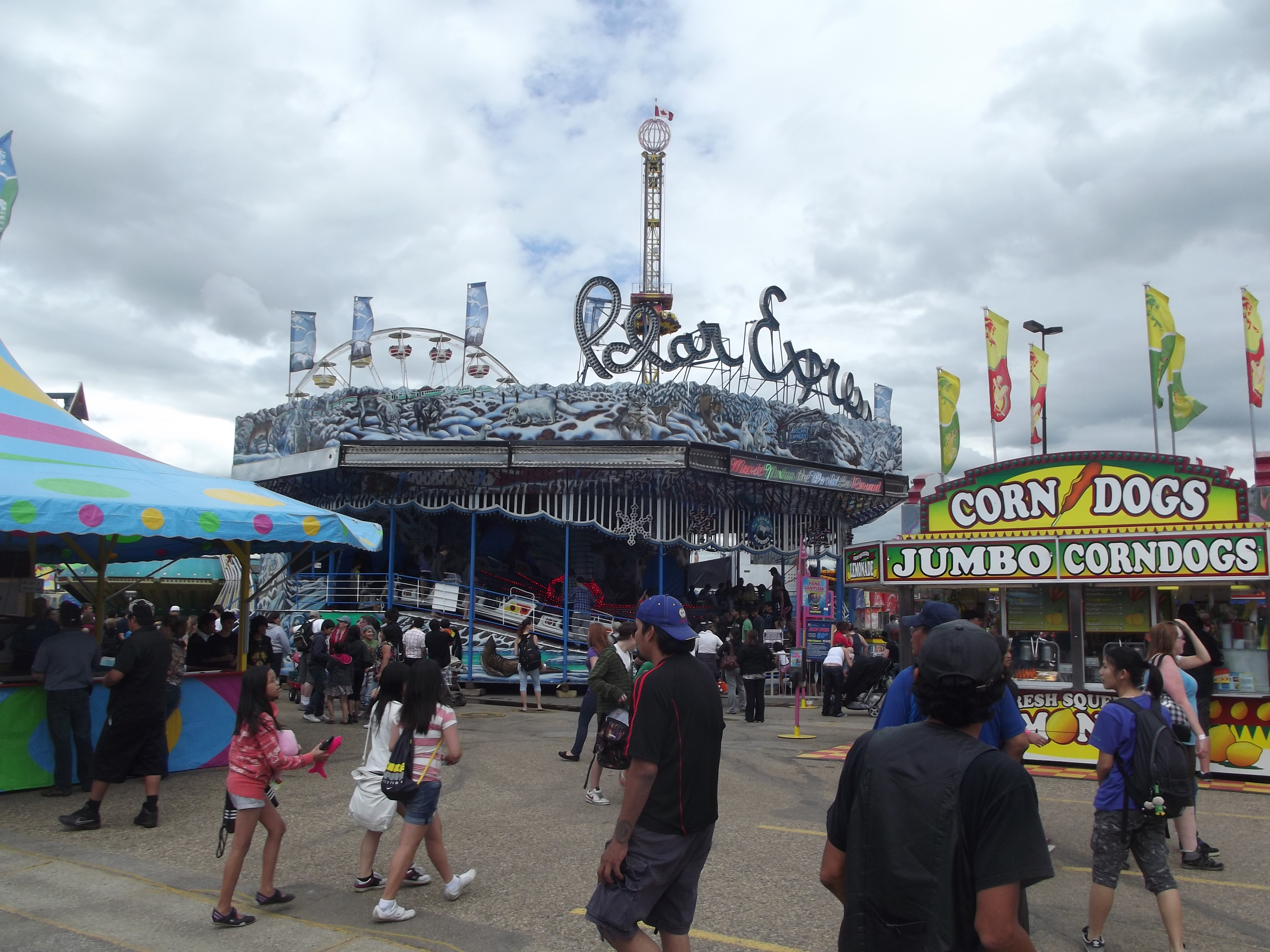 Capital EX midway